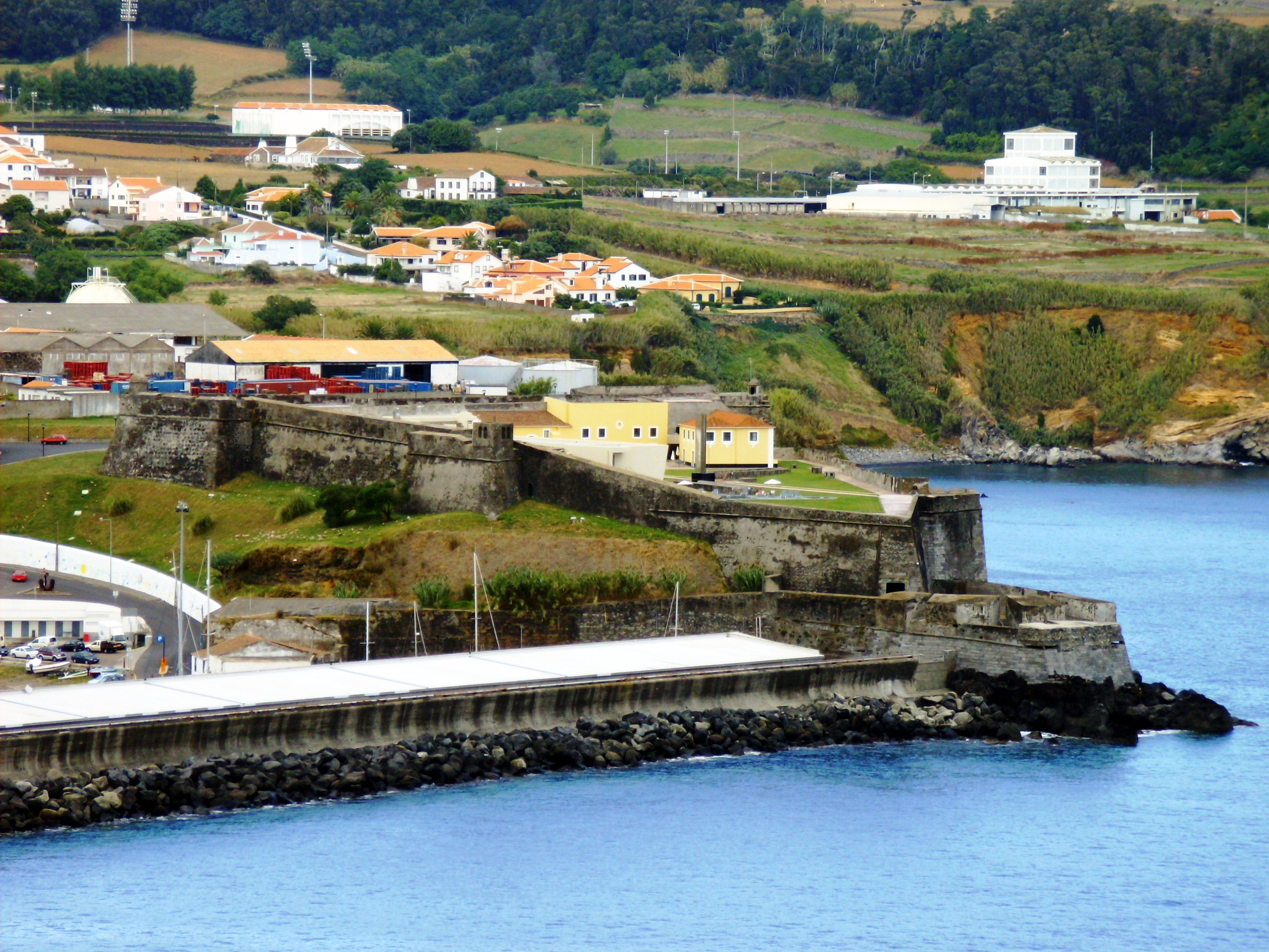 Forte de São Sebastião, freguesia de Nossa Senhora da Conceição, cidade e concelho de Angra do Heroísmo, ilha Terceira, Açores: no terrapleno as instalações da Pousada